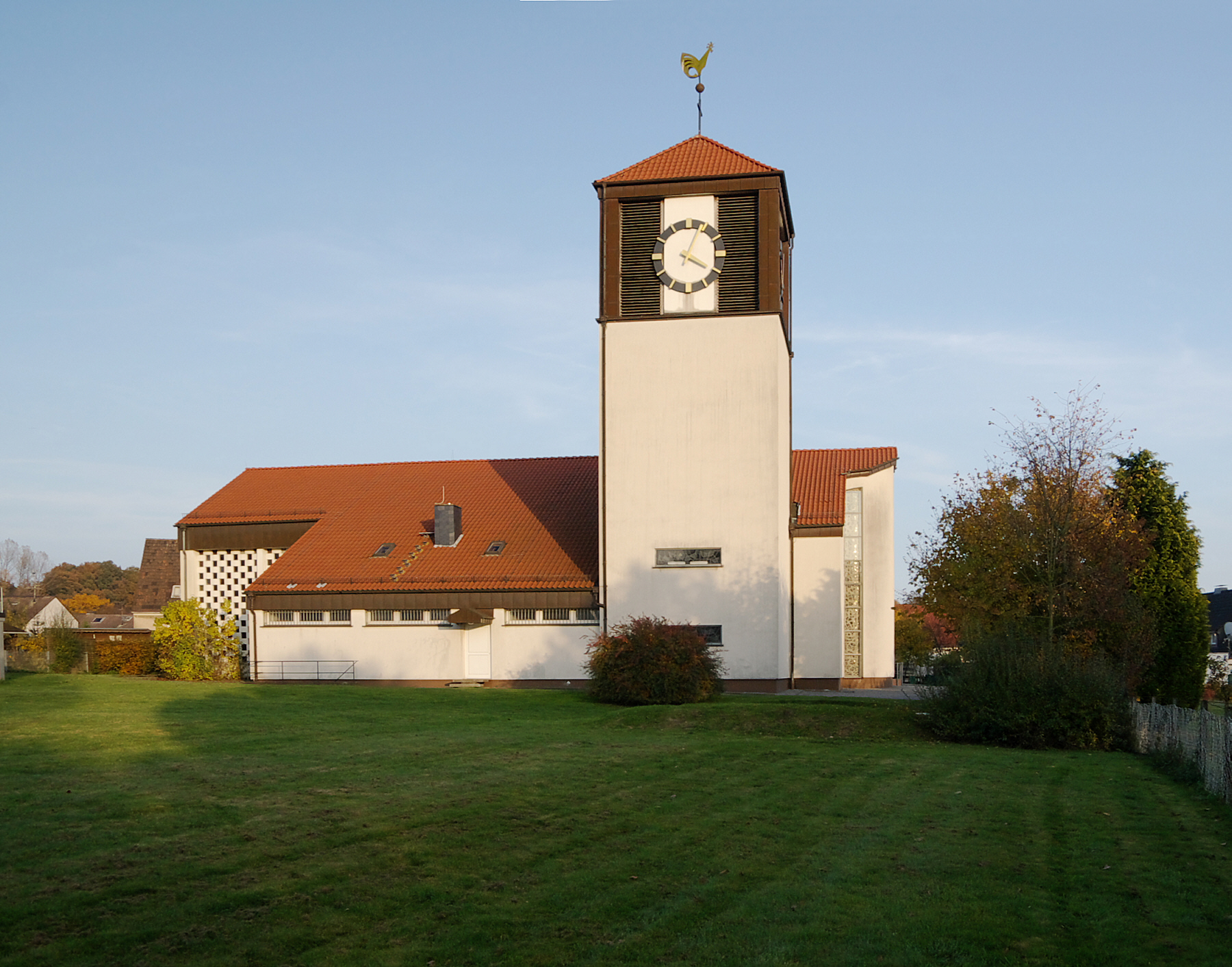 Katholische Kirche St. Konrad in Fröndenberg-Langschede, Nordrhein-Westfalen, Deutschland.